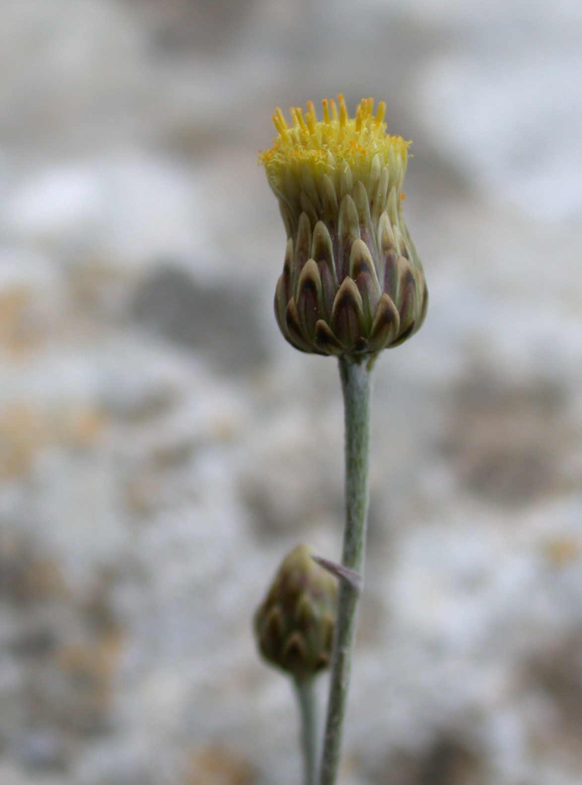 Phagnalon rupestre (L.) DC. (צמרנית הסלעים), Mount Carmel, Israel, April 4, 2008.